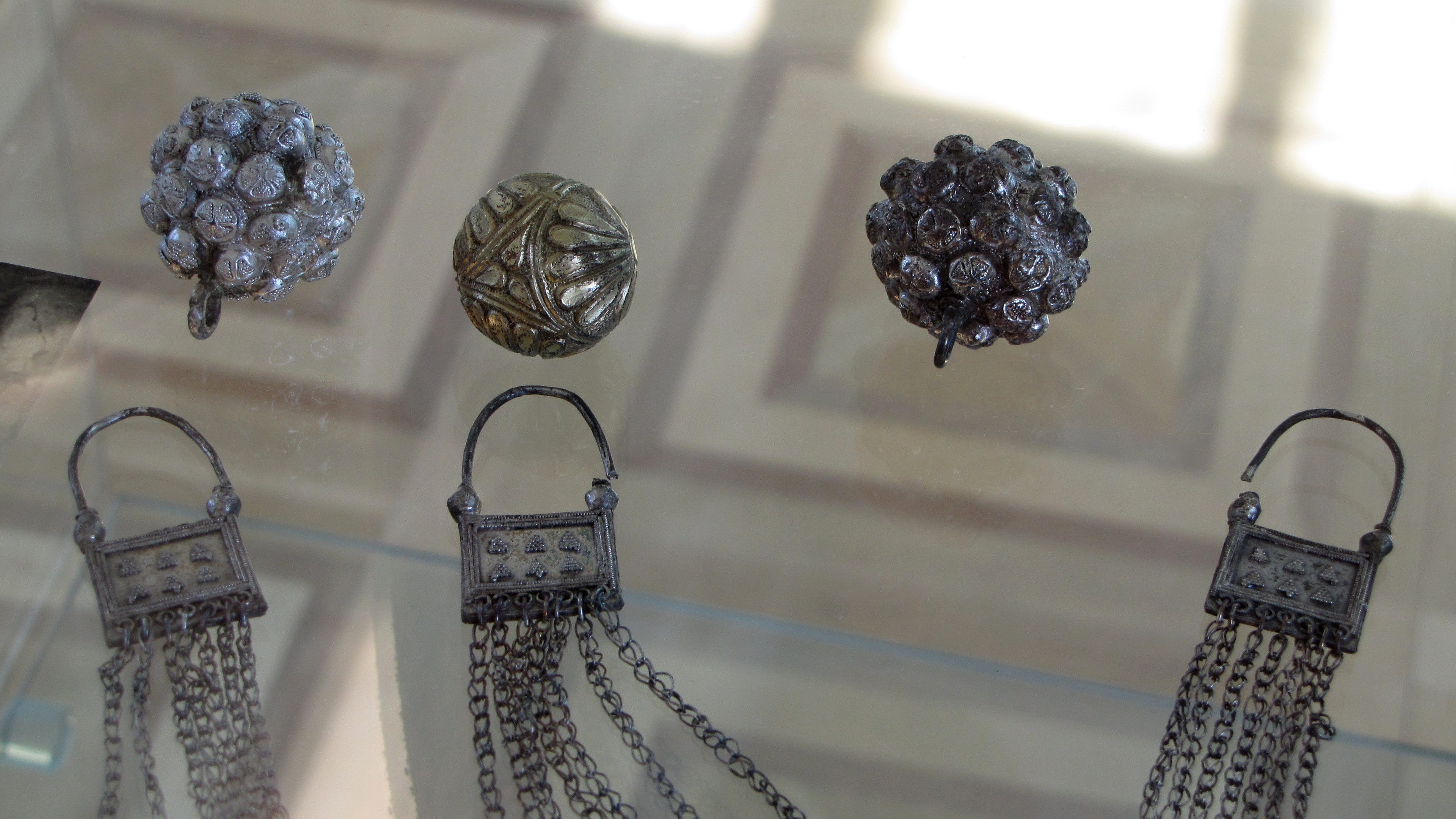 Expozice Velkomoravské Pohansko Městského muzea v Břeclavi na zámku Pohansko, velkomoravské gombíky